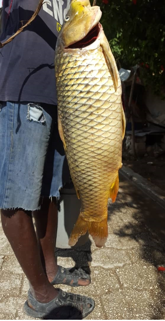 Une carpe herbibore